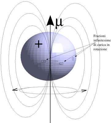 Campo magnetico generato da un nucleo di spin non nullo in rotazione. Creato con OpenOffice Draw 1.1.1 e riscalato con The Gimp Ovviamente, rilasciato sotto GNU Free Documentation License.